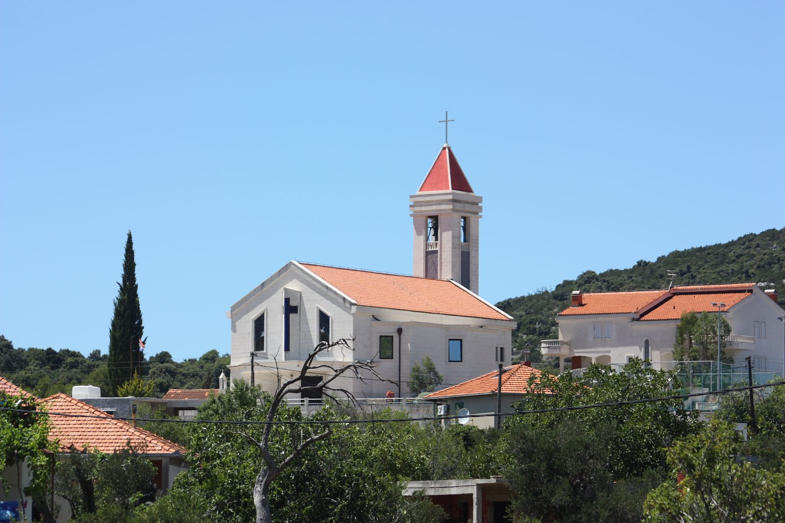 Vinisce